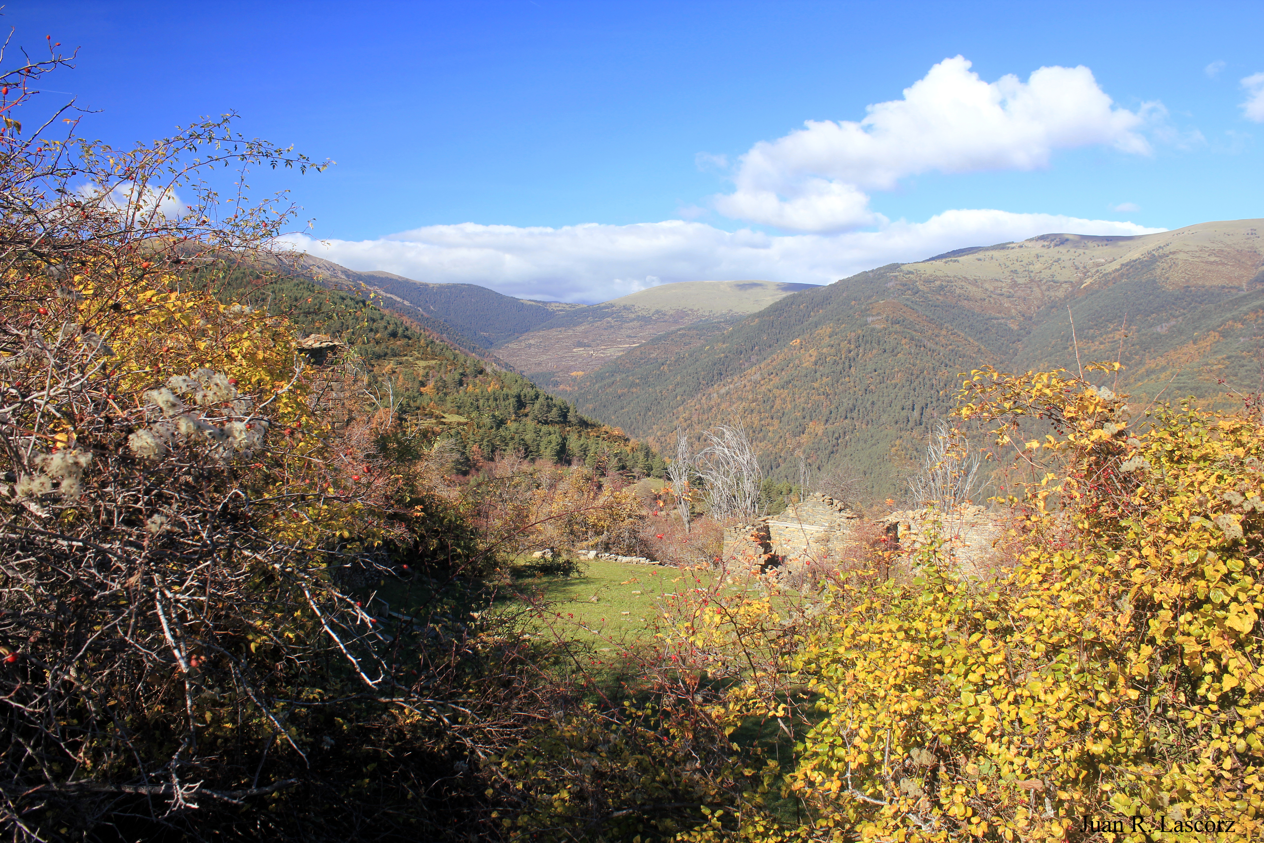 Aragonés: A valle d'Otal, de Sobrepuerto, dende Basarán.